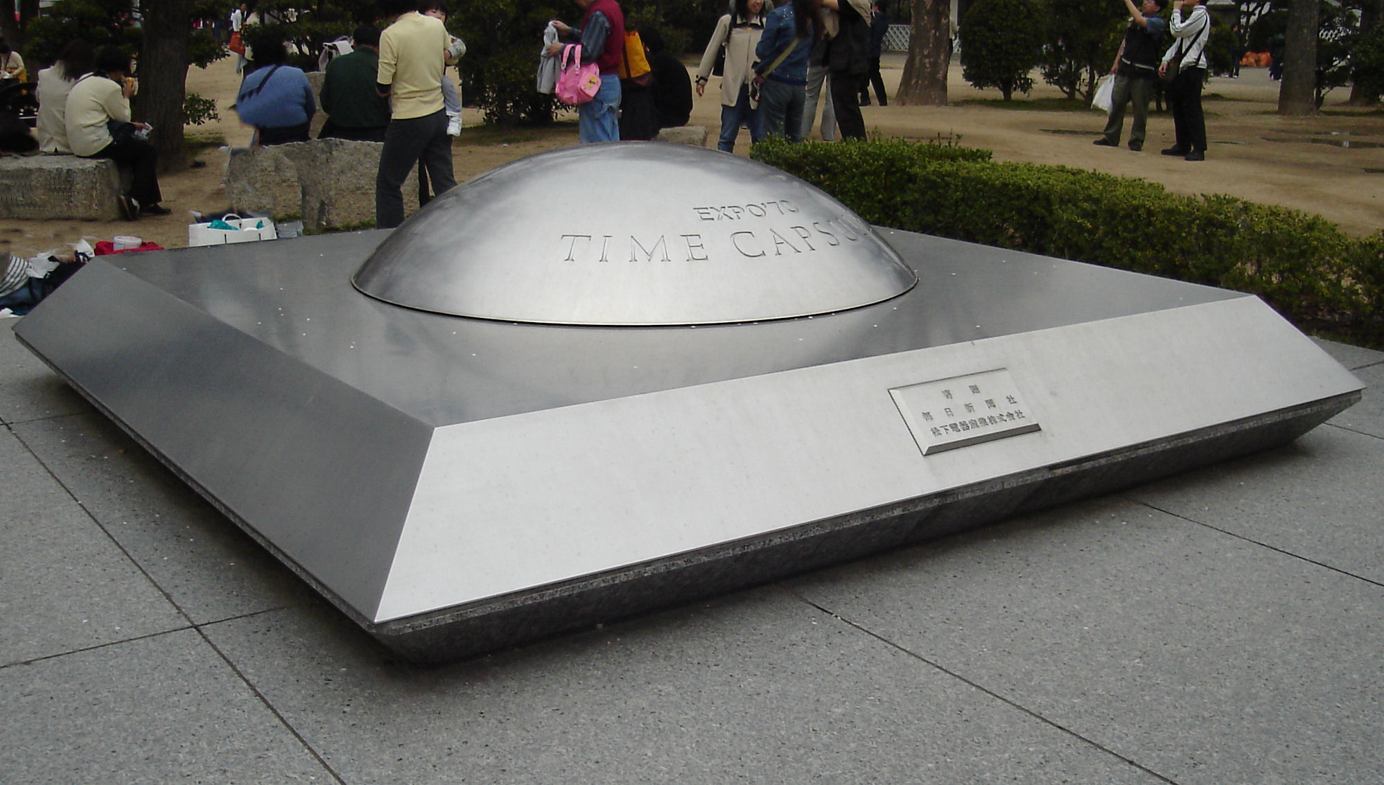 EXPO70 Time Capsule in Osaka Castle (日本万国博、松下館タイムカプセル)